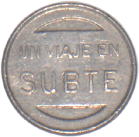 Cospel del Subte de Buenos Aires